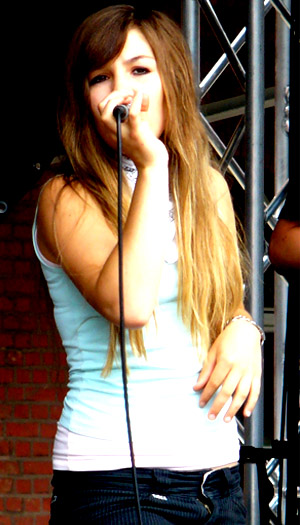 Debo live 2008